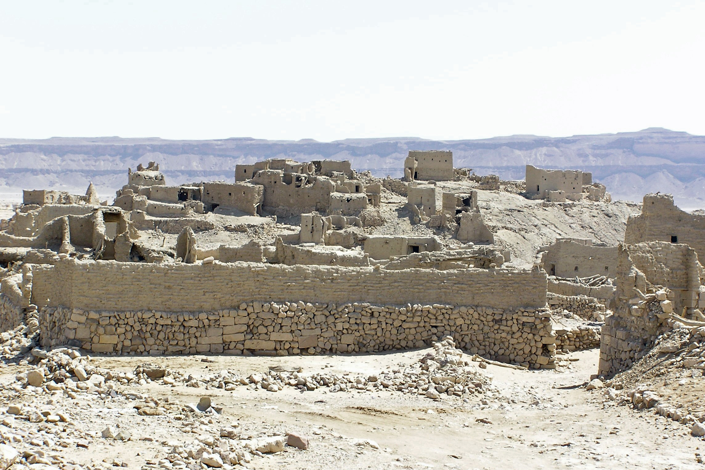 Yémen - Ruines du rempart de Shabwah